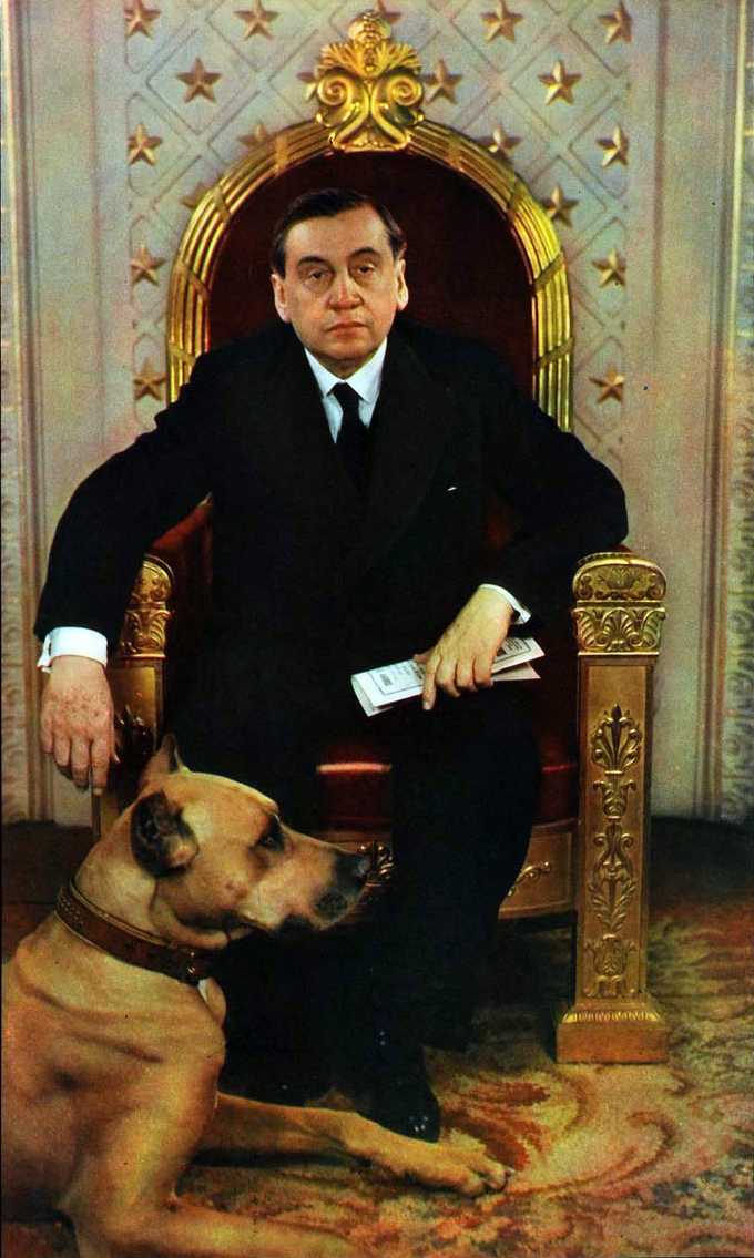 Arturo Alessandri Palma (1868 - 1950) Presidente de la República de Chile en dos periodos (1920-1925, 1932-1938). Fotografía de su segundo periodo presidencial, junto a su perro gran danés "Ulk"